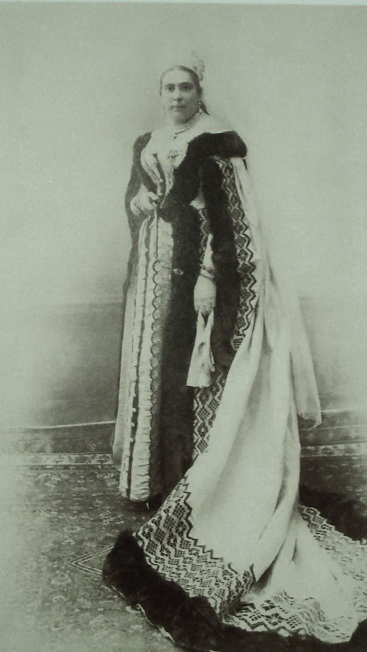 Гончарова Елизавета Александровна, урожденная Герштенцвейг (1845—1907), фрейлина.